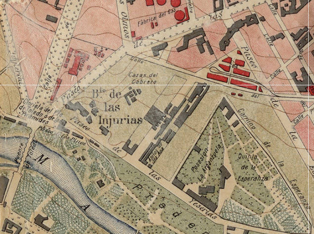 Detalle del barrio de Las Injurias en el plano de Nuñez Granés y Castro Les, de 1918.